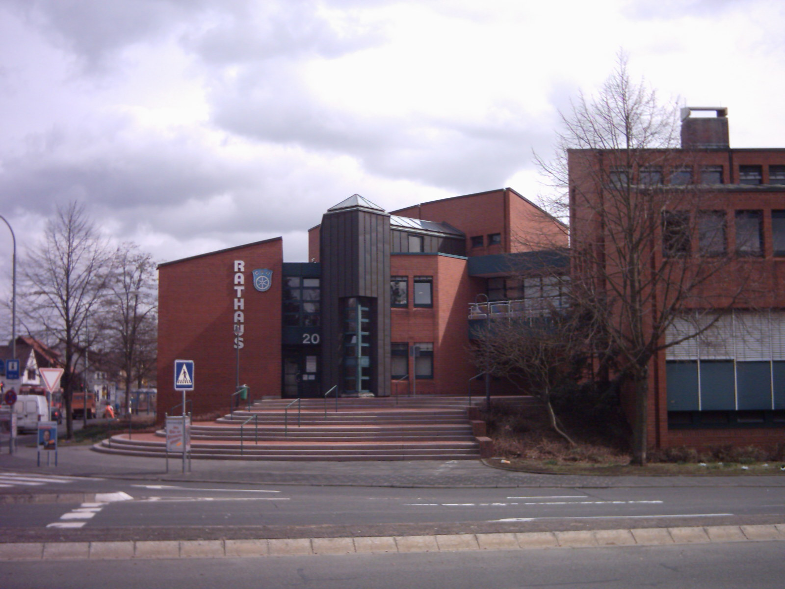 Rathaus der Stadt Mühlheim am Main